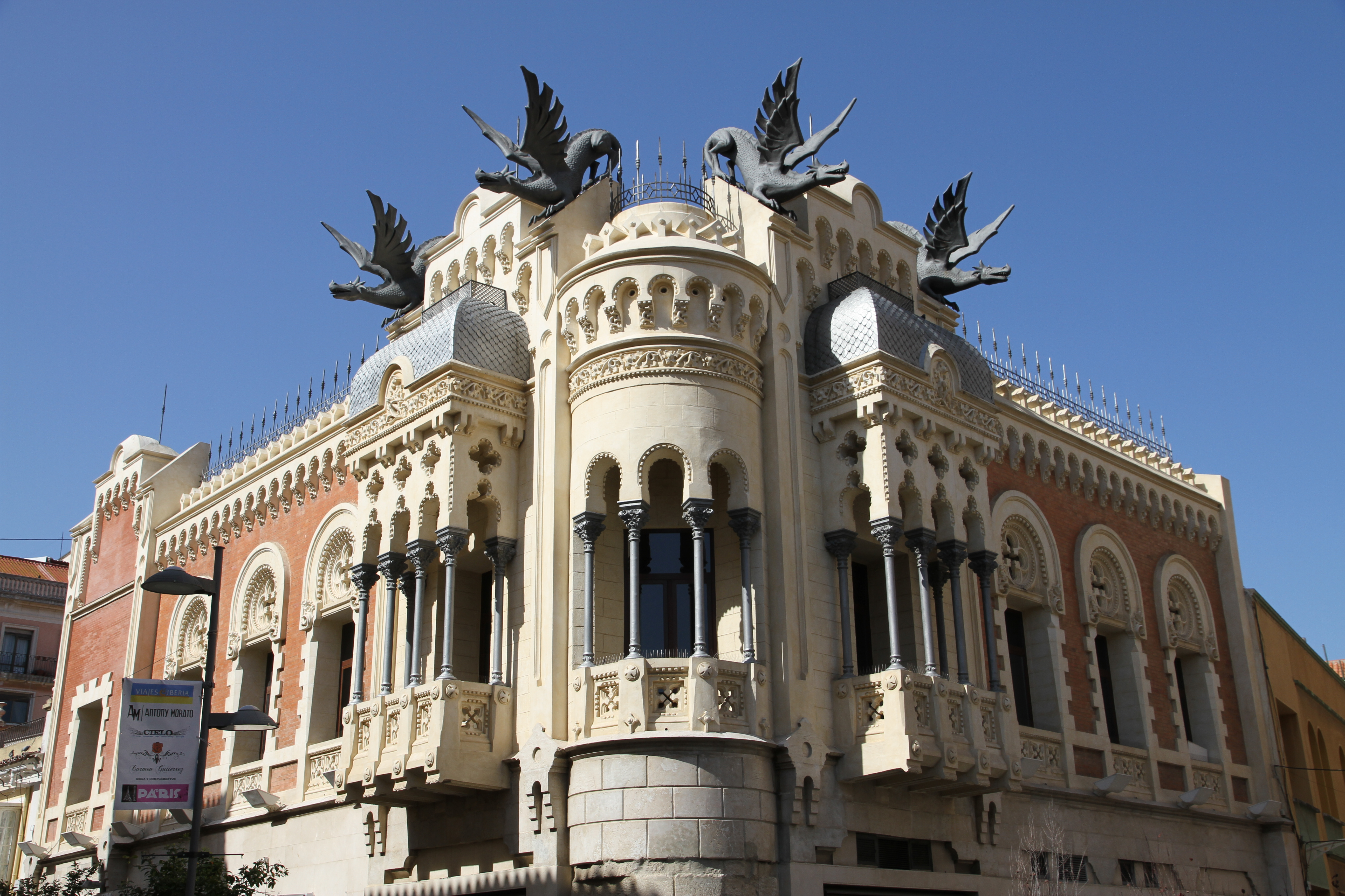 Ceuta, España